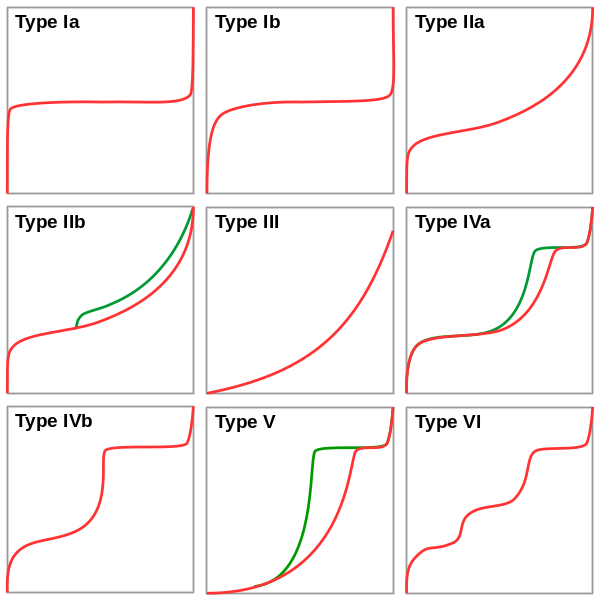 Classification des isothermes d'adsorption selon l'IUPAC